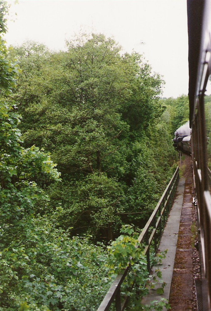 Photo von einer Sonderfahrt mit der luxemburgischen Lokomotive "CFL 5519" (DR Baureihe 042) auf der Hochwaldbahn Trier-Hermeskeil 1994. Der Zug überquert gerade eine der vielen Ruwerbrücken.